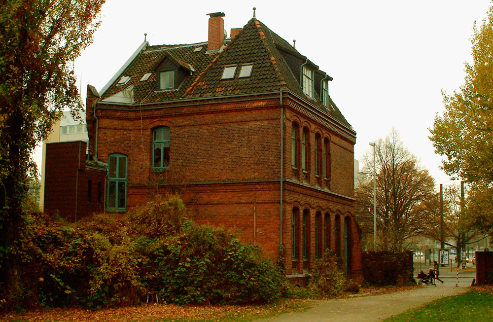 Die ehemalige Direktorenvilla, heute Braunstraße 28 in Hannover, vom 2010 neu angelegten Durchgang zur Leine